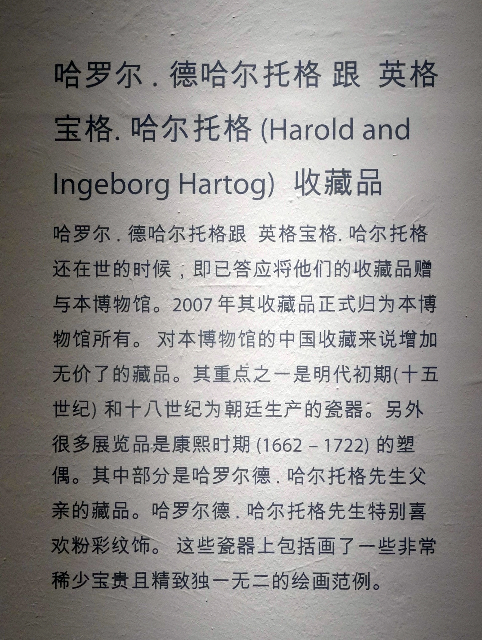 Porzellan aus China - Vitrinen der Sammlung von Harold und Ingeborg Hartog im MKG Hamburg